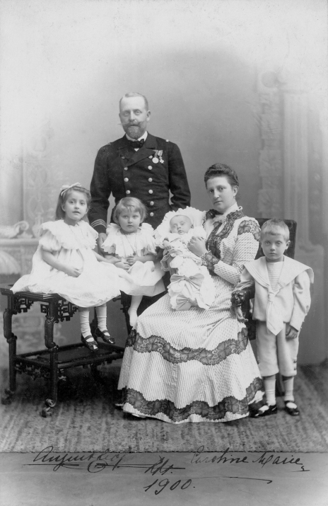 Prinzen August Leopold von Sachsen-Coburg und Gotha, Karoline von Österreich-Toskana mit ihren älteren Kindern.